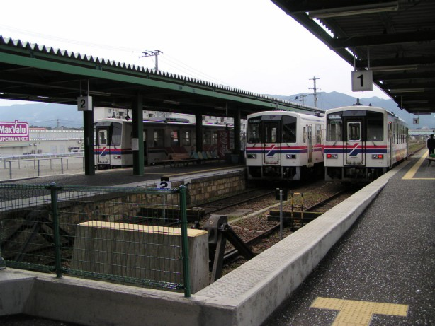 2005年3月26日に投稿者が撮影した伊万里駅松浦鉄道ホームです。